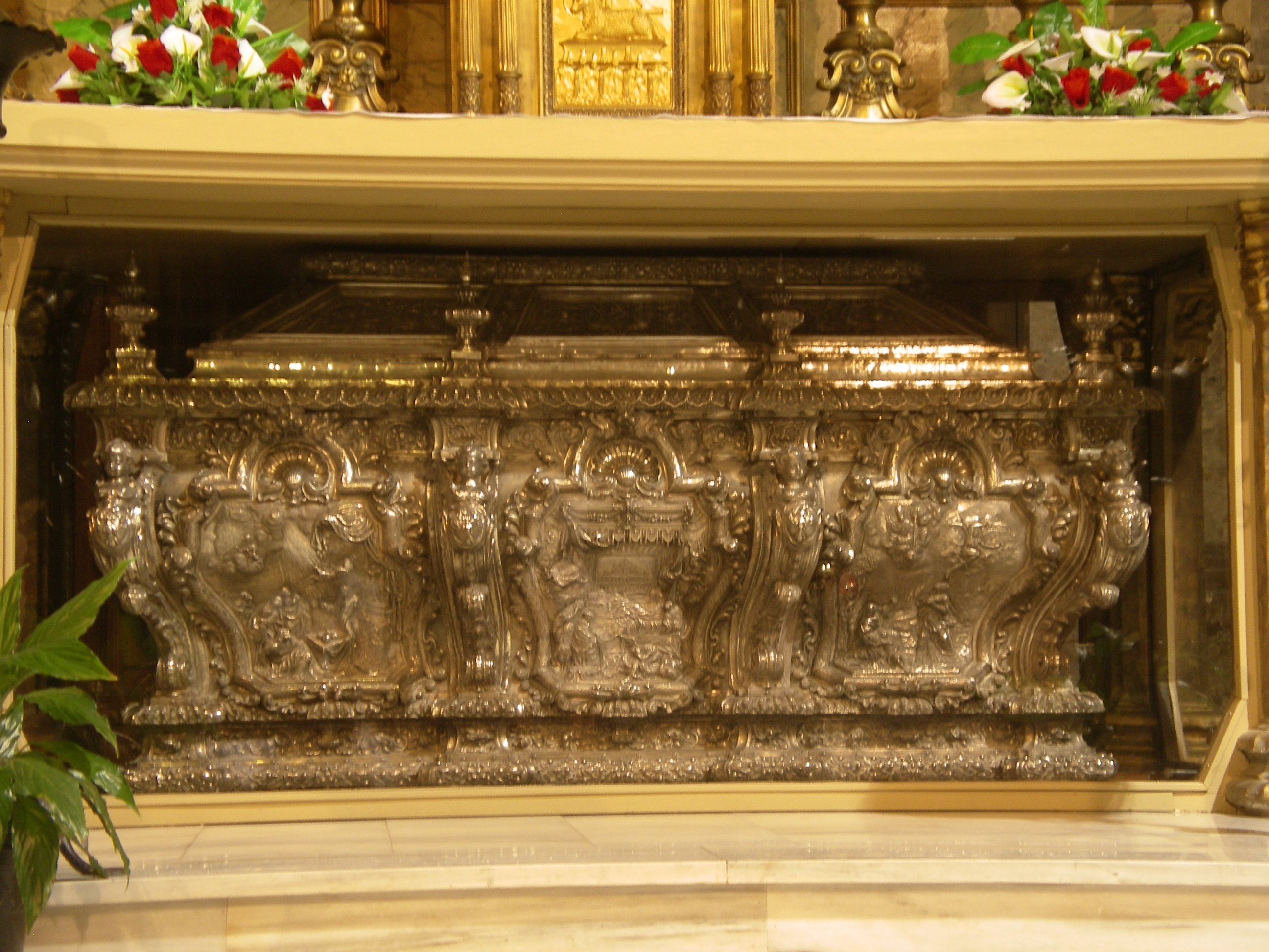 Urna de Sant Bernat Calbó, en la Catedral de Vic, en plata, obra de Joan Matons, s. XVIII